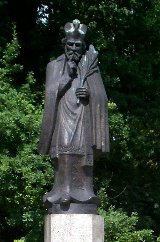 Figura św. Jana Nepomucena w Olsztynie (replika)